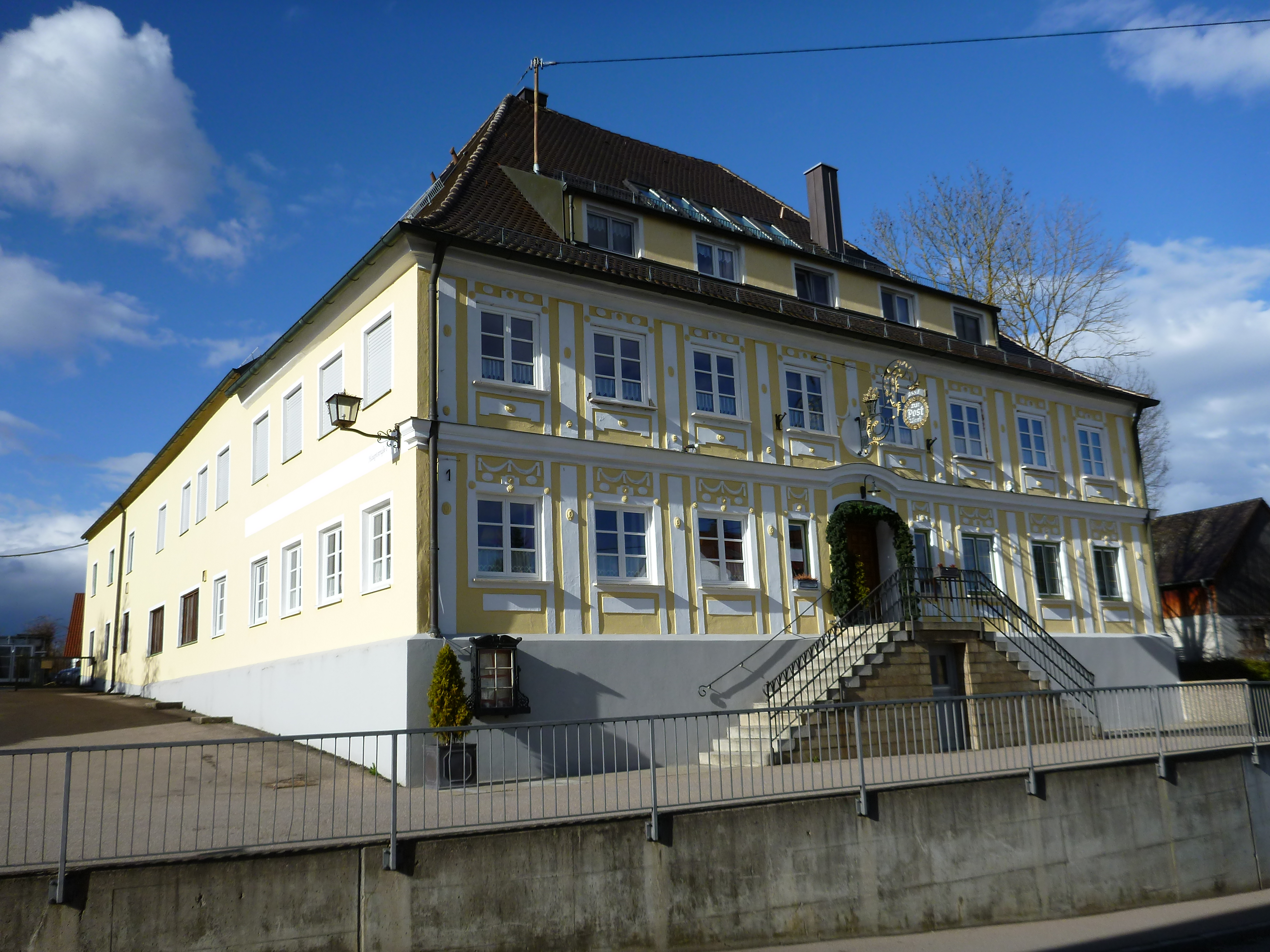 Gasthof Post, Walmdachbau mit klassizistischer Putzgliederung an der Südfassade, um 1790.